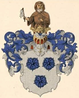 Kotzebue suguvõsa aadlivapp